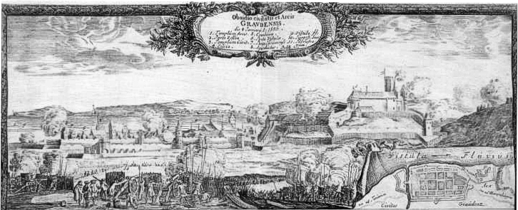 Grudziądz, 1656 during Polish-Sweden war